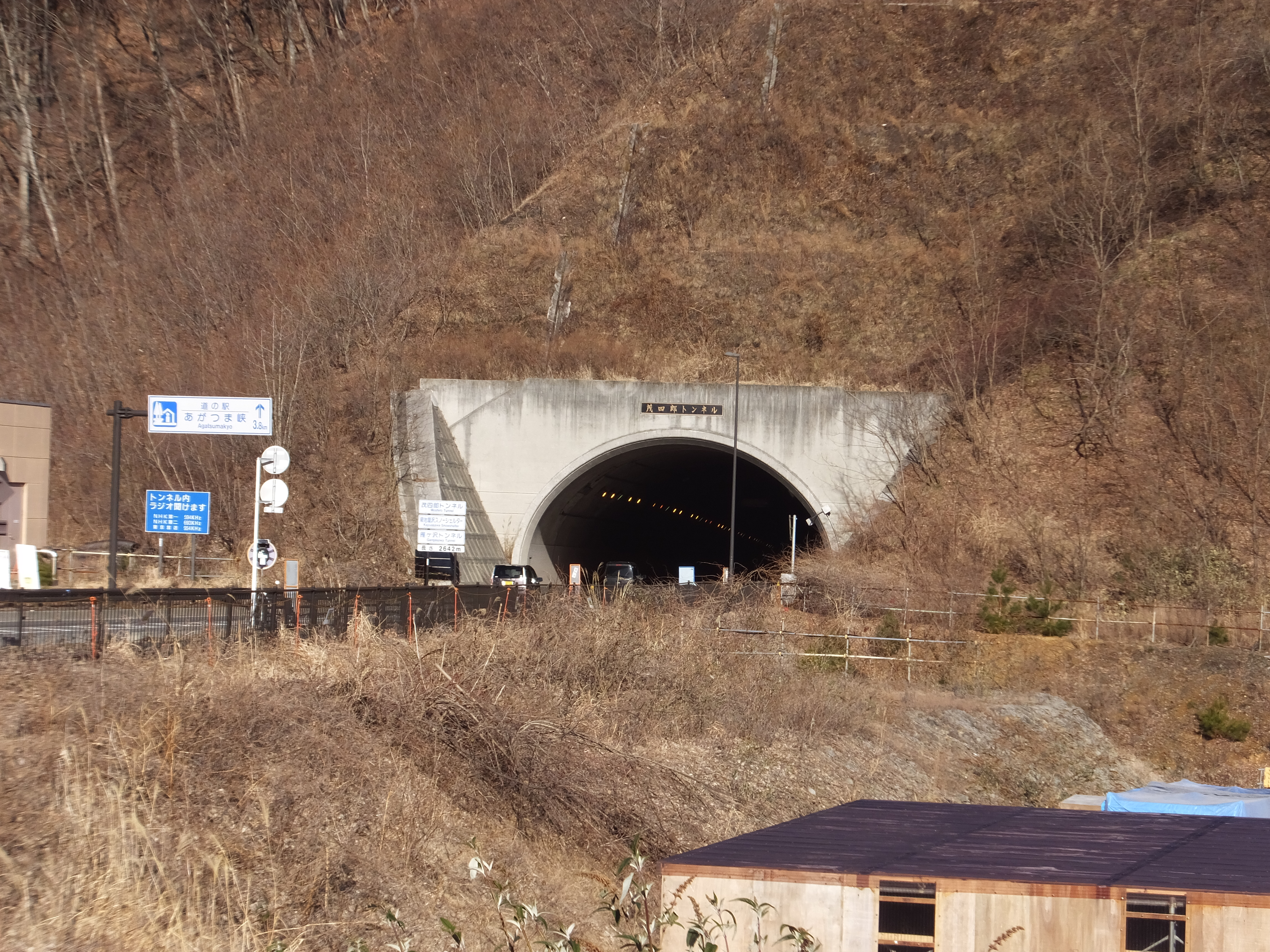 やんば見放台周辺から茂四郎トンネルを望む 2016年12月